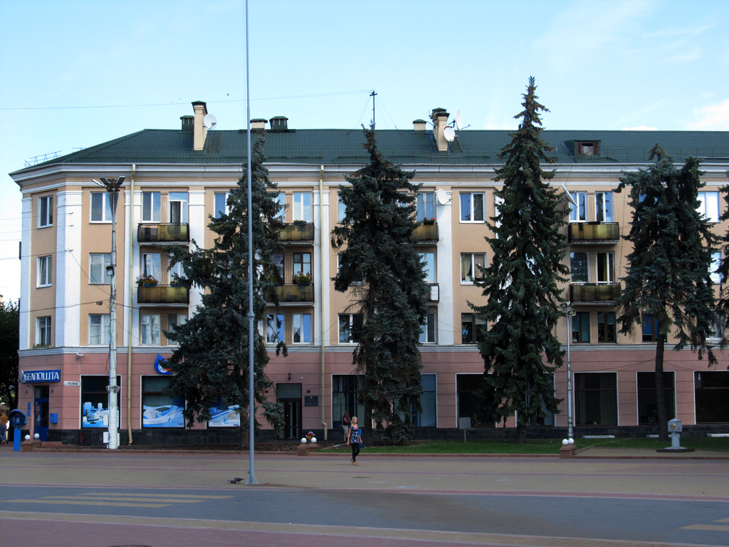 Брэст. вул. Леніна, 32 / вул. Пушкінская, 1